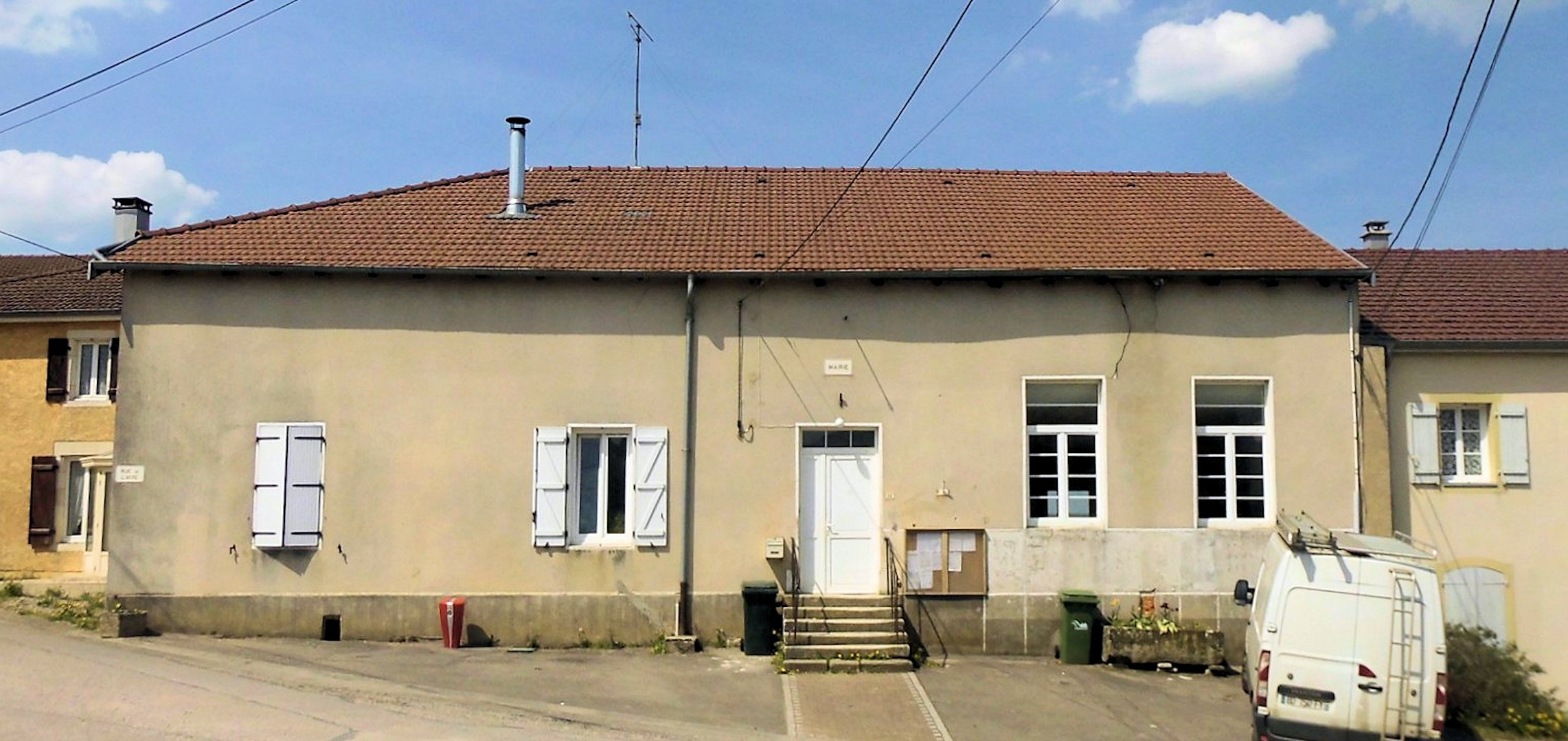 La mairie de Saint-Paul